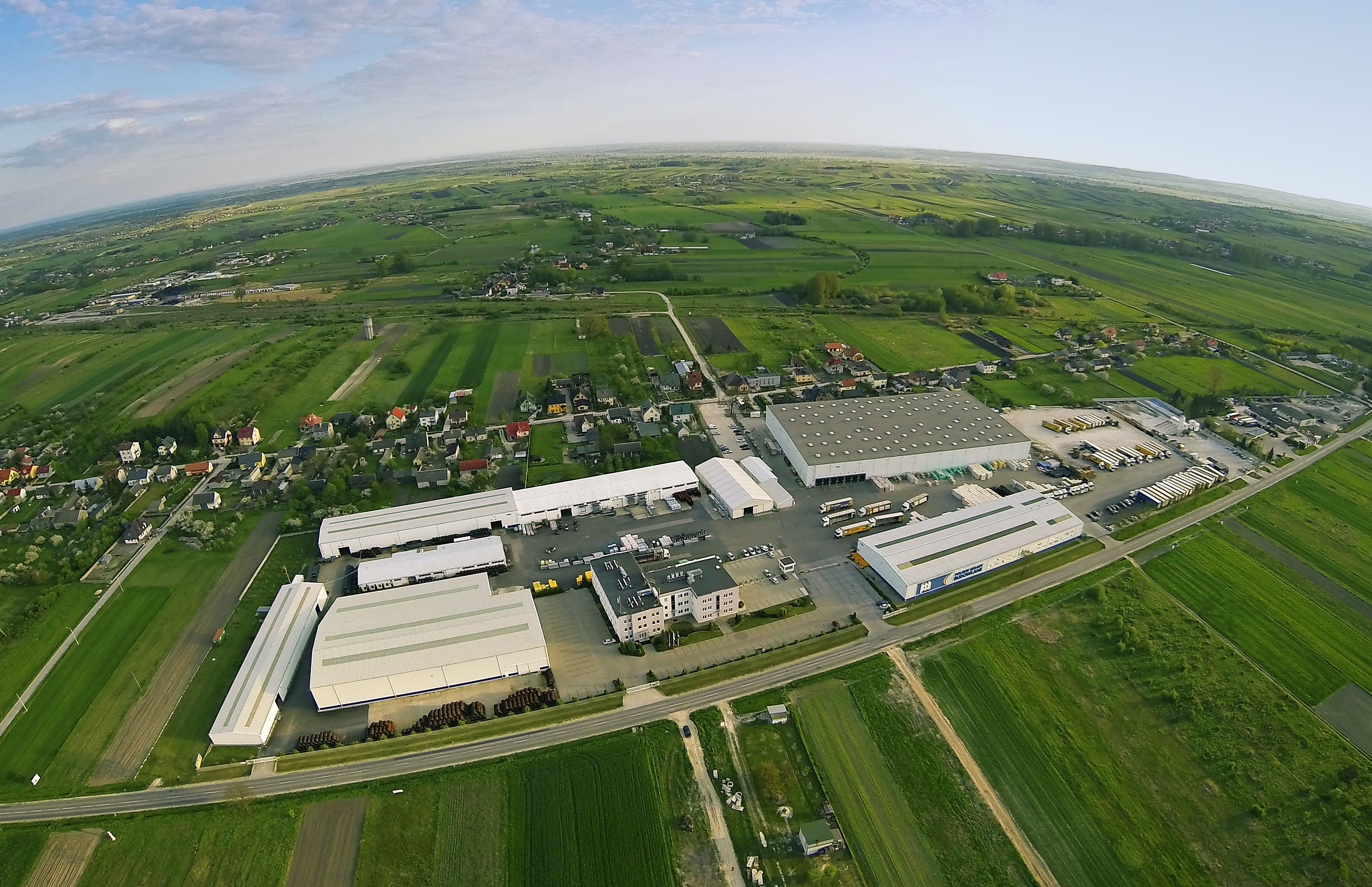 Grupa PSB S.A. (centrala)